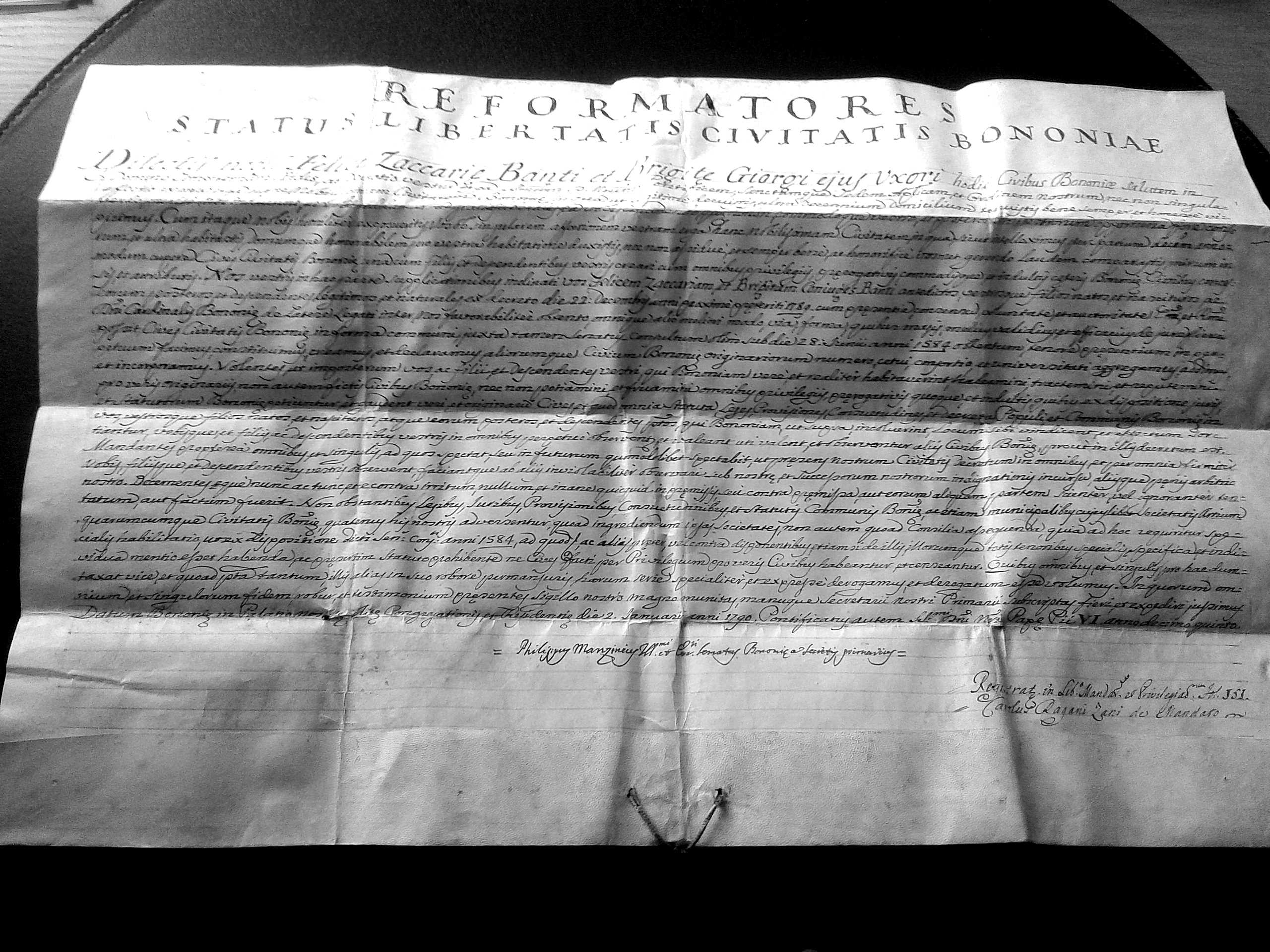 "REFORMATORES STATUS LIBERTATIS CIVITATIS BONONIAE" Cittadinanza onoraria della Città di Bologna rilasciata a Zaccaria Banti, a sua moglie Brigida Giorgi ed ai suoi figli presenti e futuri. Rilasciato in Bologna in data 2.1.1790 ("Papae Pii VI annodecimoquinto")